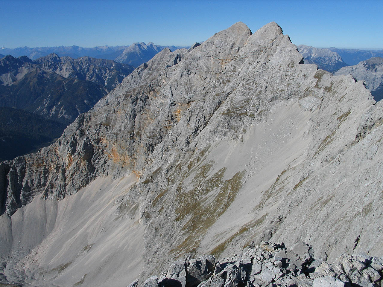 Praxmarerkarspitze (2642 m) von der Kaskarspitze, Karwendel, Tirol, Österreich (15. Oktober 2005) Photograph: Luidger